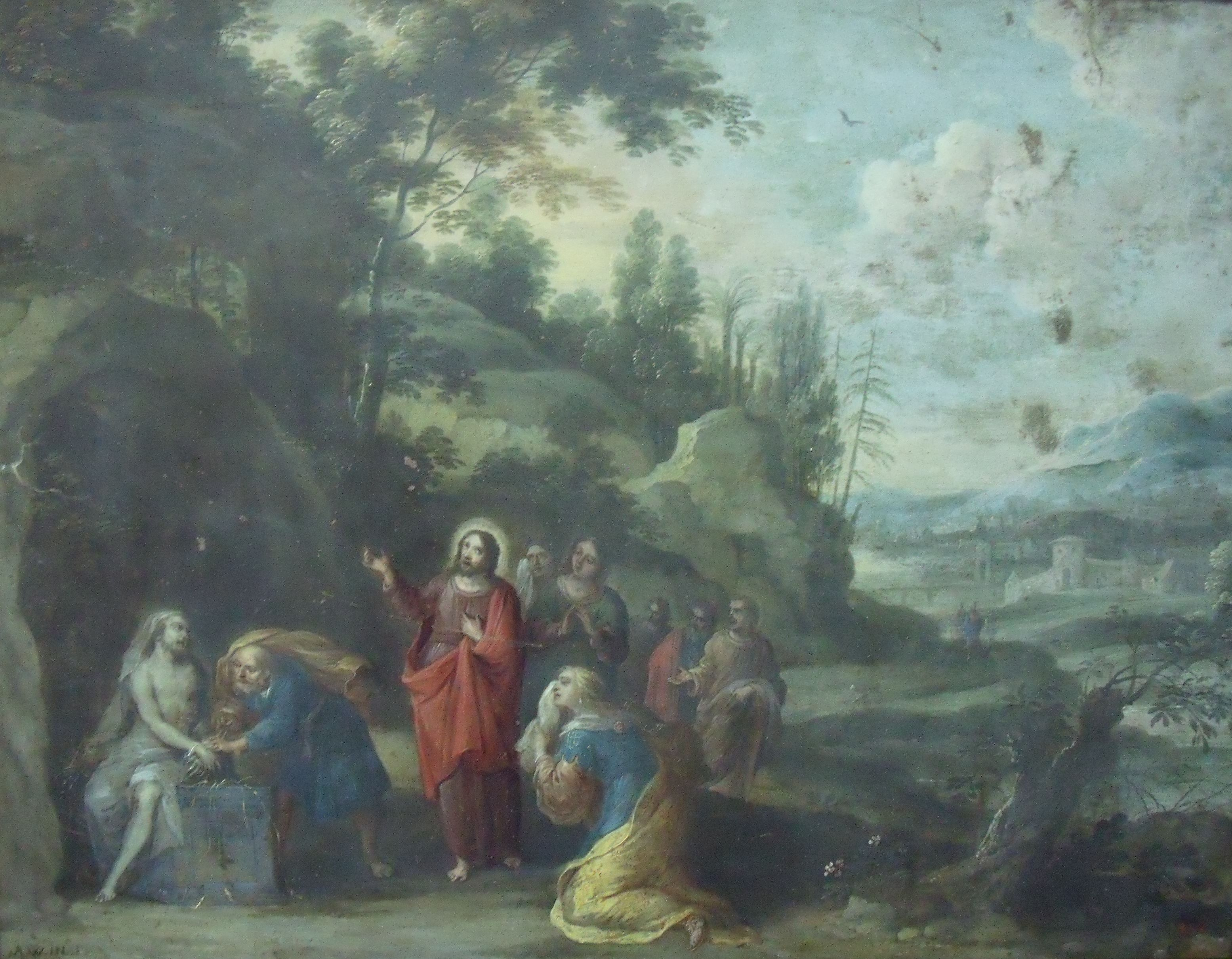 Pintura religiosa del segle XVII que representa la resurrecció de Llàtzer sobre un fons de paisatge. A la banda esquerra trobem Llàtzer resucitat envoltat d'una llum metafísica que surt de la cova amb la cara tapada i lligat, mentre a l'altra banda trobem Crist envoltat per la llum del miracle Marta i Maria, germanes de Llàtzer, i alguns curiosos que assisteixen a la revelació del miracle de Déu.